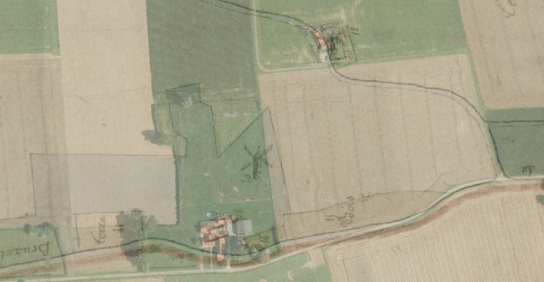 carte superposant par géolocalisation la carte satellite de la PPIGE et les cartes anciennes des archives du Nord